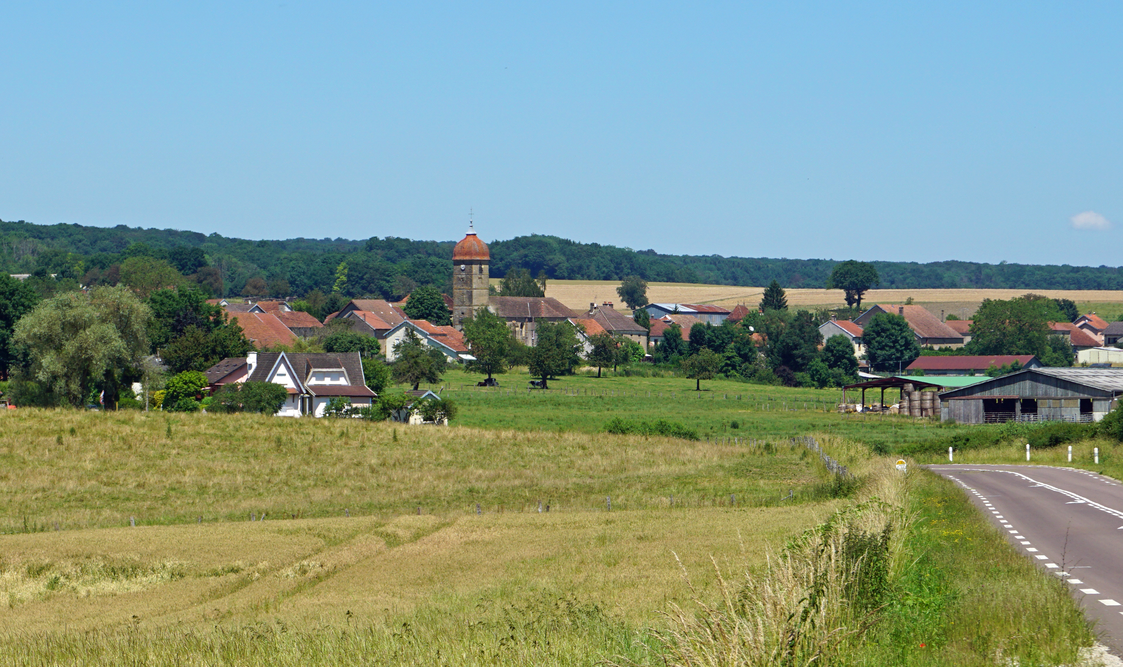 Varogne.